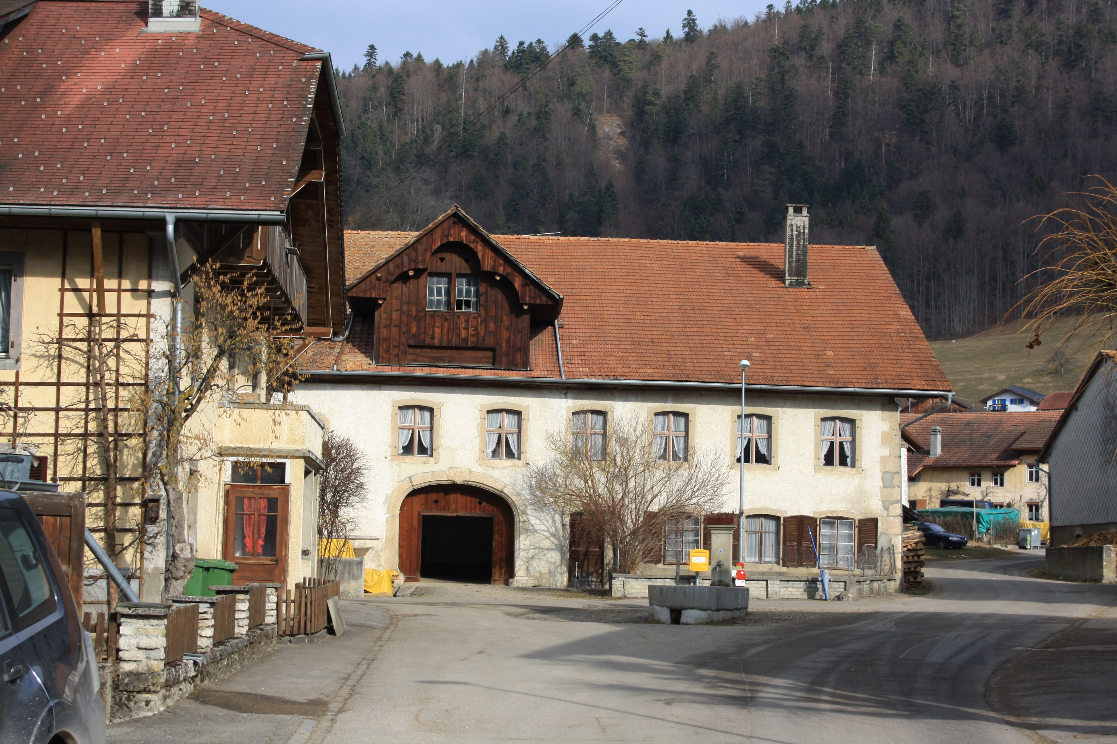 Saules BE